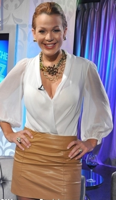 Luz García